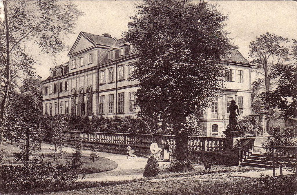 Aus der Sammlung von Jürgen Wessel, als Lichtdruck vervielfältige Fotografie um 1900 aus der Parkanlage eines Teils des (heutigen) Von-Alten-Gartens vor der Nordseite des Lindener Schlosses mit Blick über die Balustrade der Terrasse zum großen Gartensaal. Im Vordergrund ist, neben den Menschen, die der Adelsfamilie von Alten angehören dürften, eine der Treppen zu sehen, die noch heute in die ehemals barocken Gartenanlage im Parterre führten. Mit der Anlage wollten die Bauherren mit dem Großer Garten konkurrieren und die geladenen Gäste beeindrucken. Von der sogenannten "Von-Alten-Buche (ganz links im Vordergrund) ist kaum etwas zu sehen ...